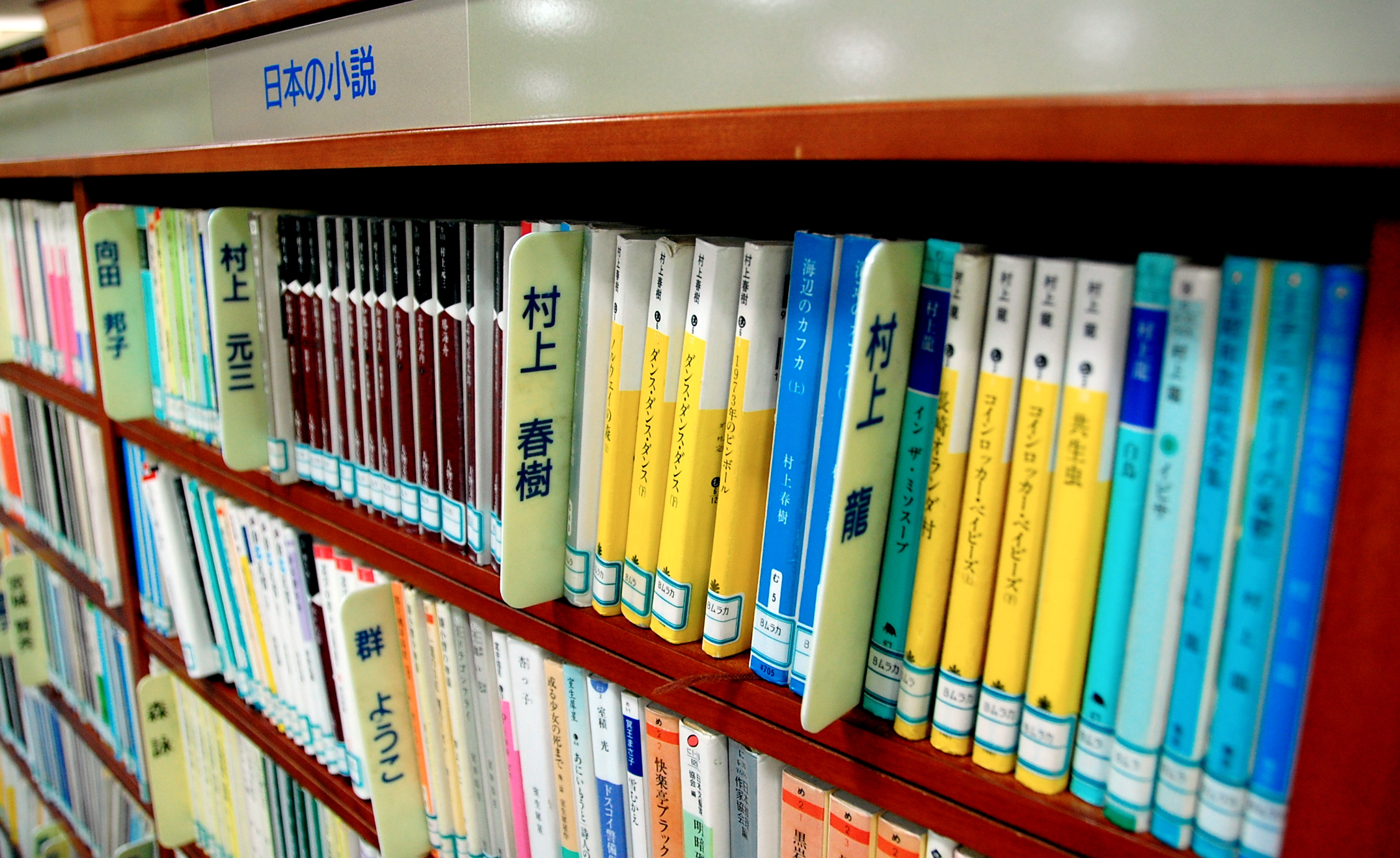 Fukuoka City Public Library